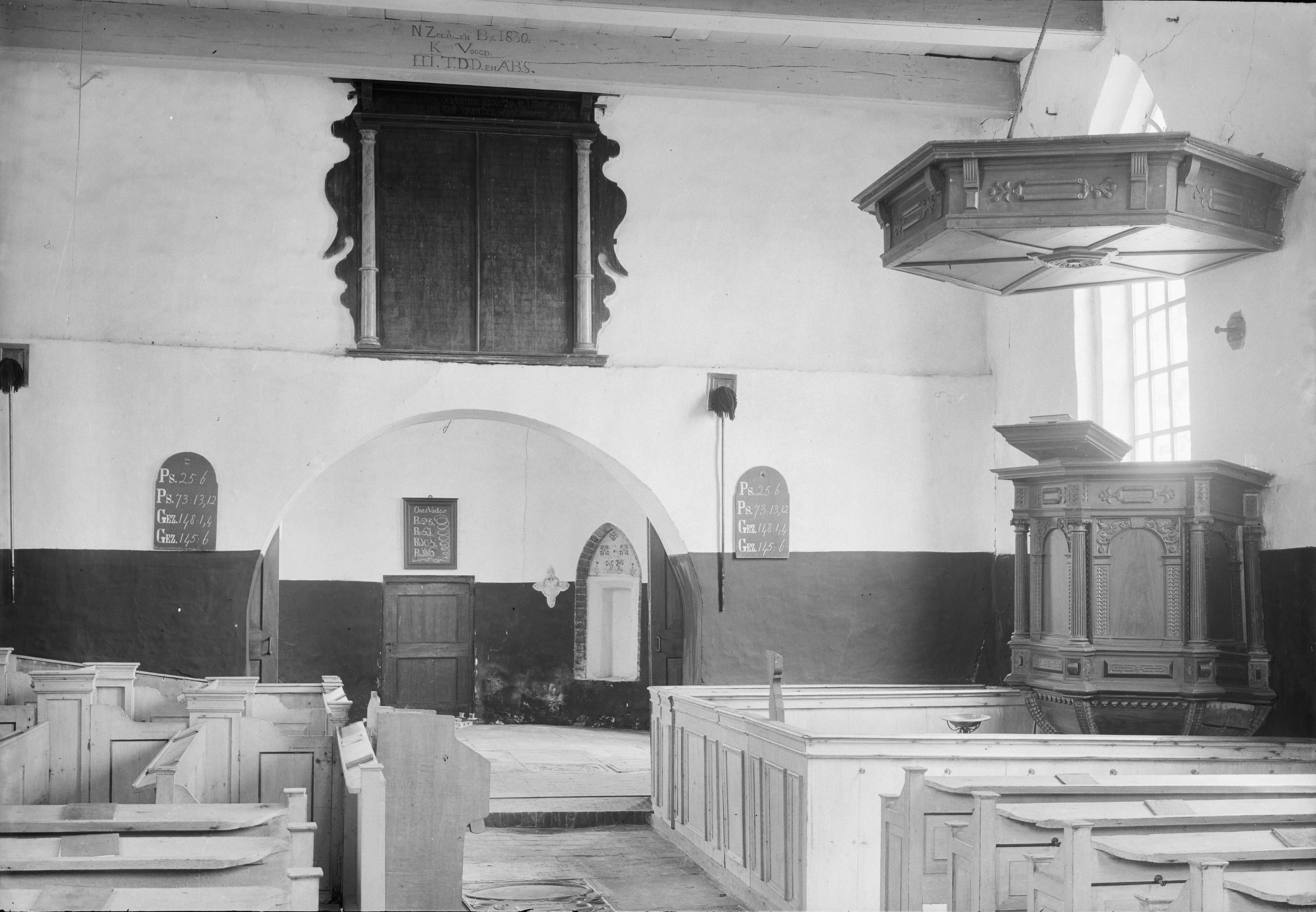 Nederlands Hervormde Kerk: Interieur, overzicht met preekstoel en kerkbanken